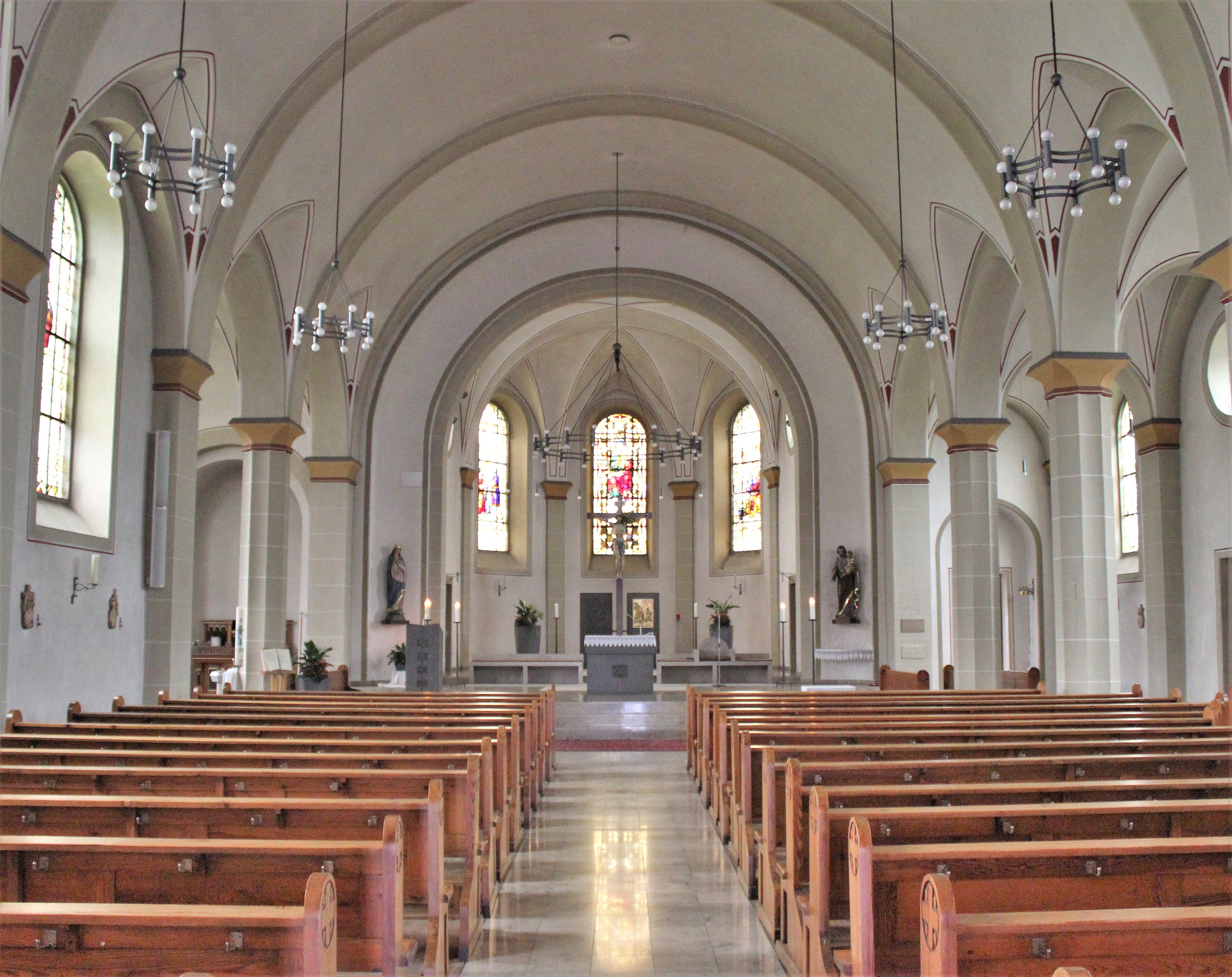 Blick ins Innere der katholischen Pfarrkirche St. Josef in Holz, einem Ortsteil der Gemeinde Heusweiler, Regionalverband Saarbrücken, Saarland